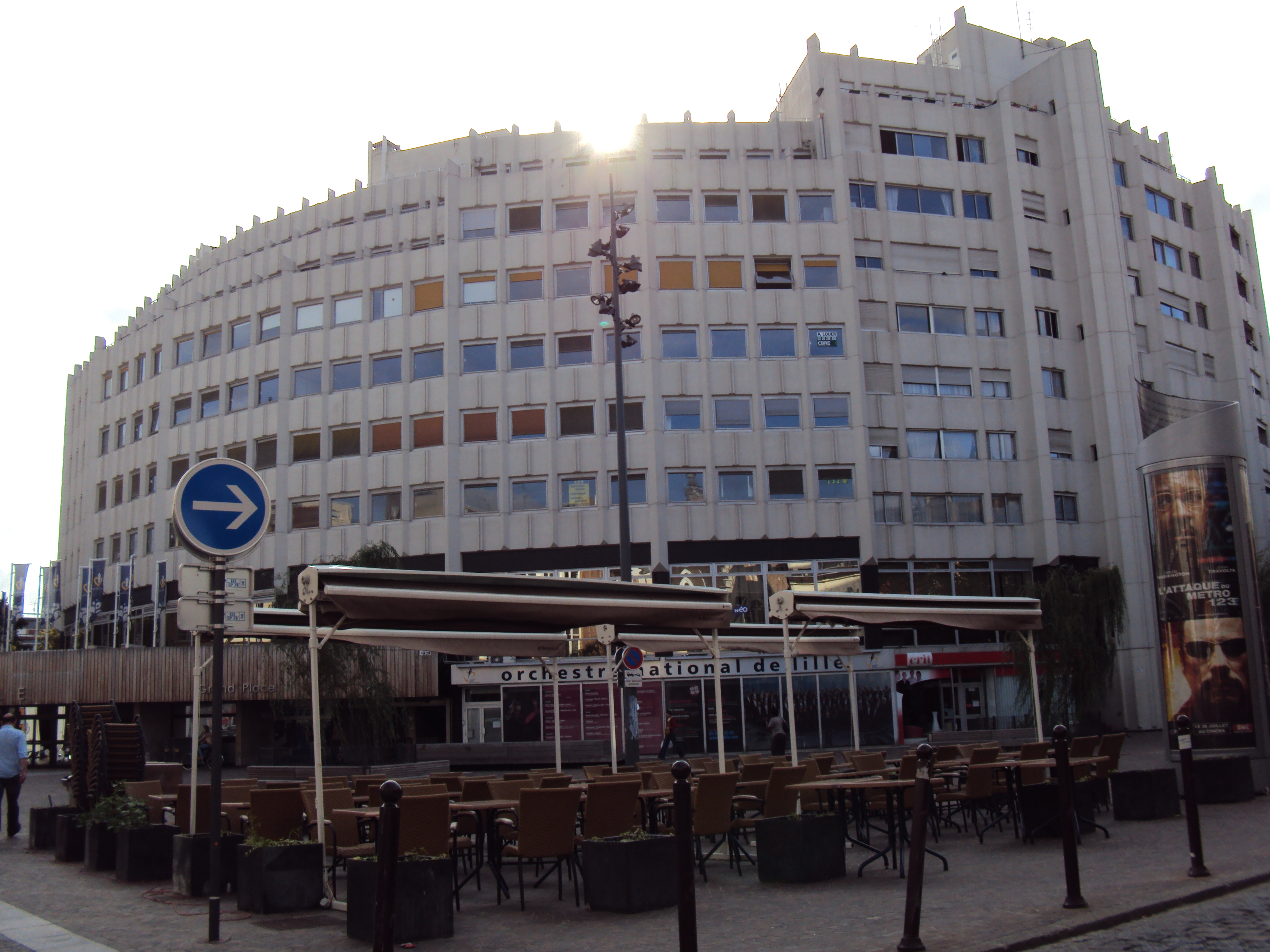 Nouveau Siècle de Lille.